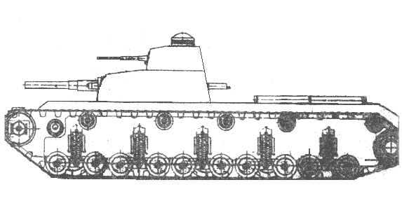 Проект тяжёлого танка Т-30, вид с левого борта.